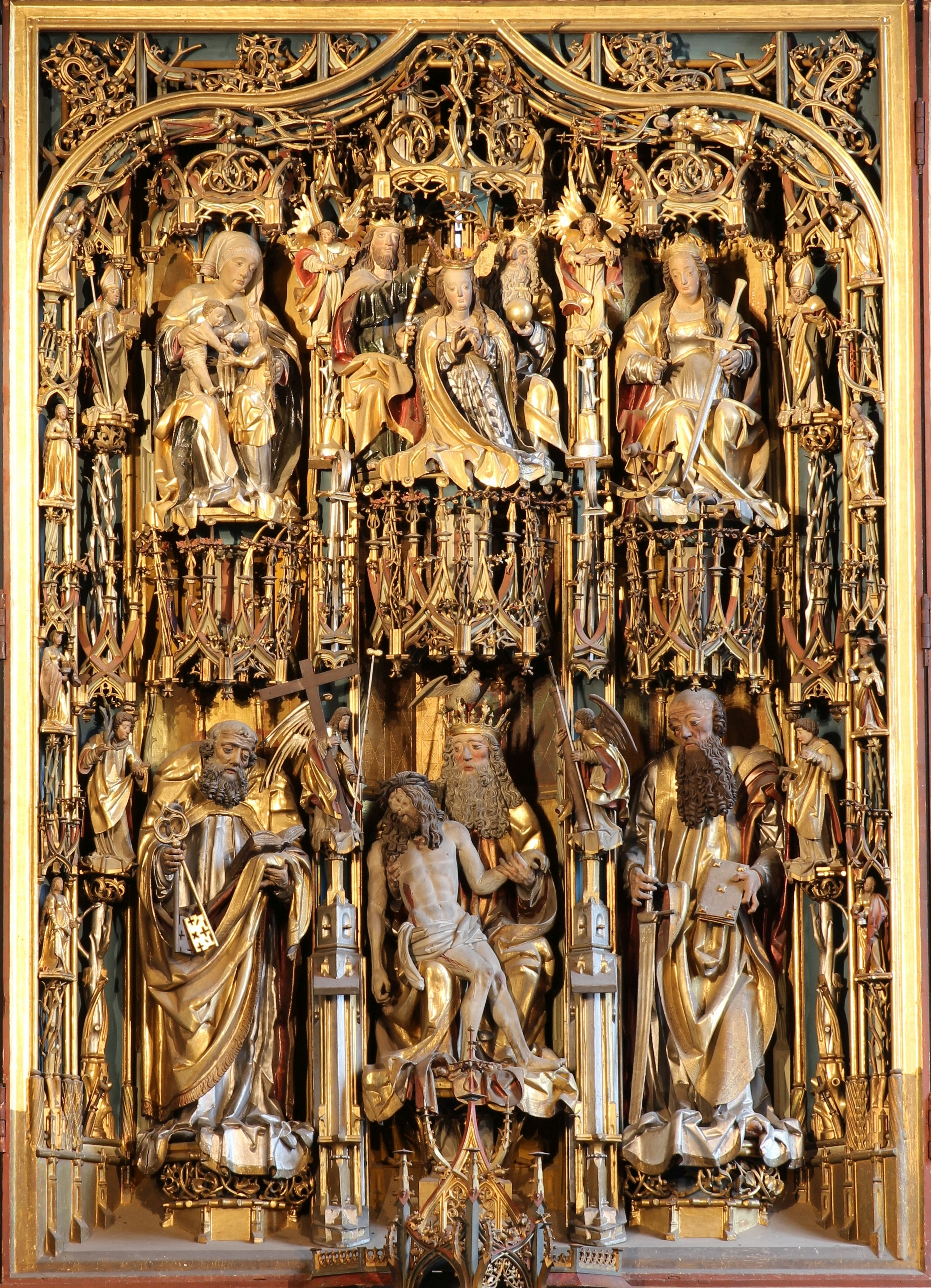 Retabel des Schnatterpeckaltars in Lana